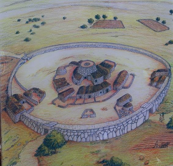 Schautafel vor dem Eingang in die Talayot-Siedlung SesPaïsses bei Artà im Nordosten Mallorcas (Ausschnitt).